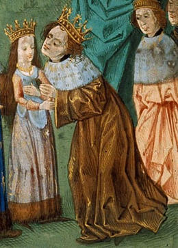 Isabela z Valois s Richardem II.